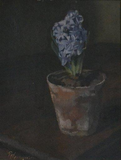 Hyazinthe. Öl auf Karton